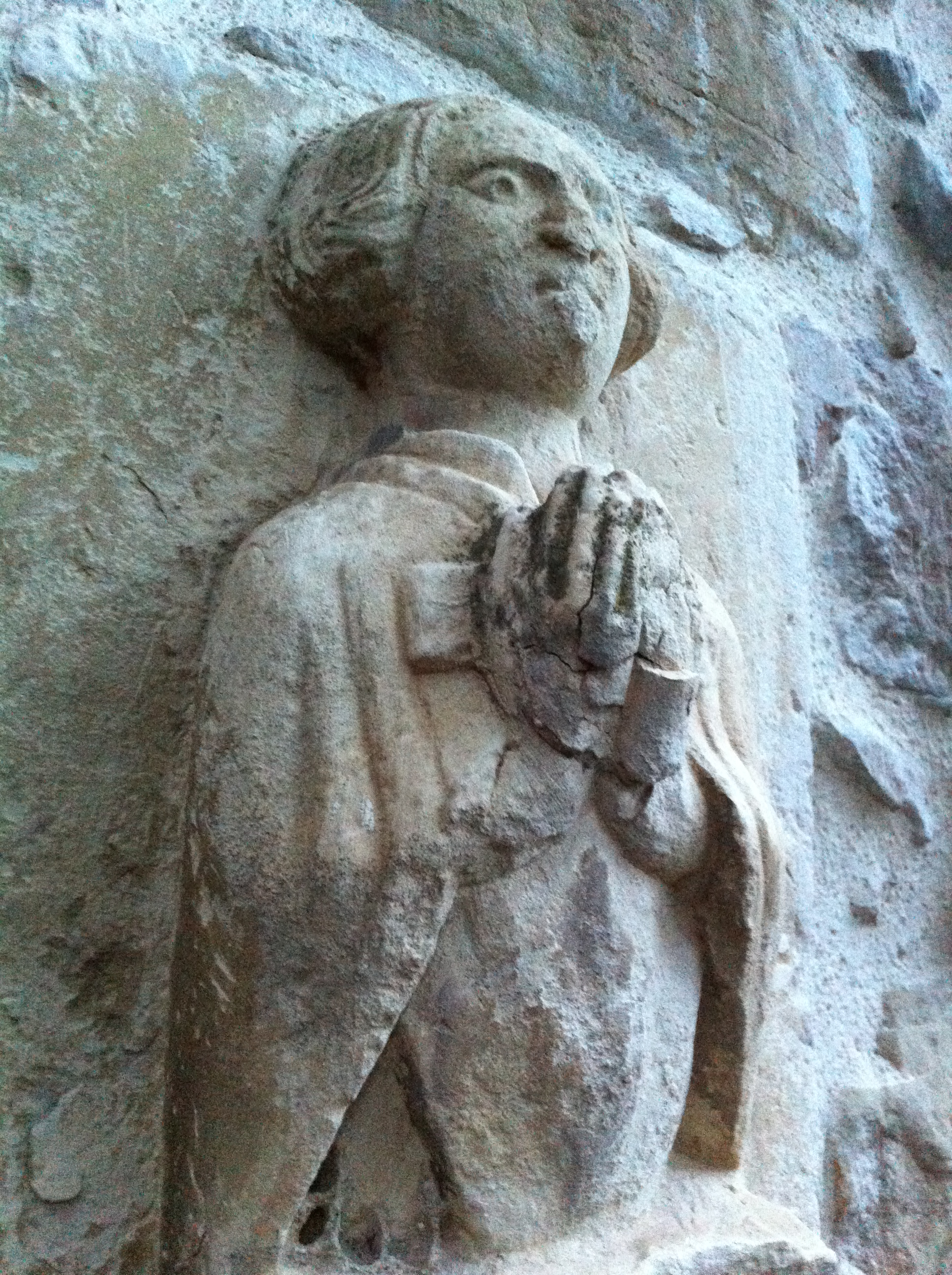 Reperto medioevale incastonato sulle pareti Licensing Categoria:Immagini di Teramo